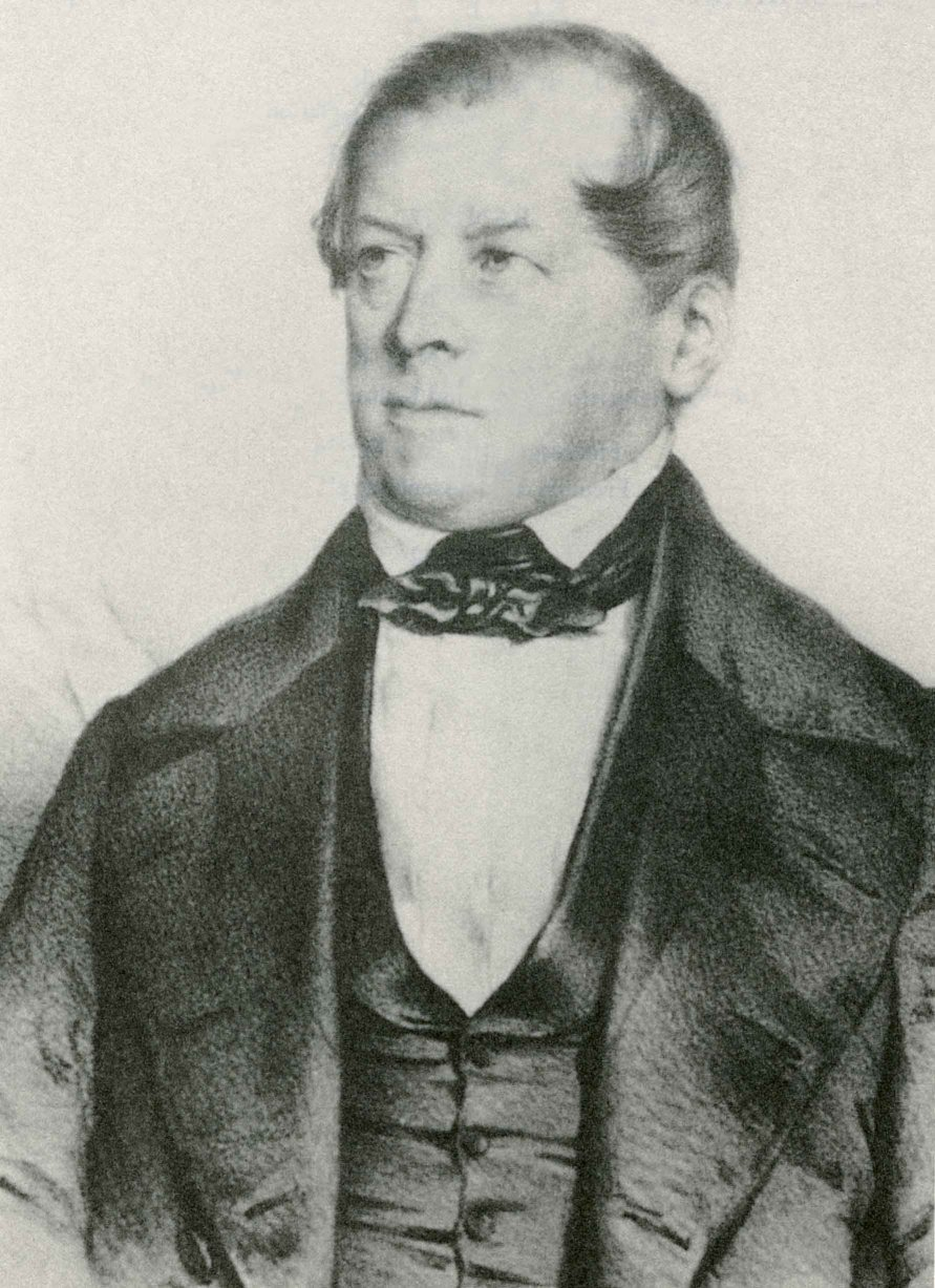 Der bayerische Politiker Franz Friedrich Carl Graf von Giech (1795-1863)